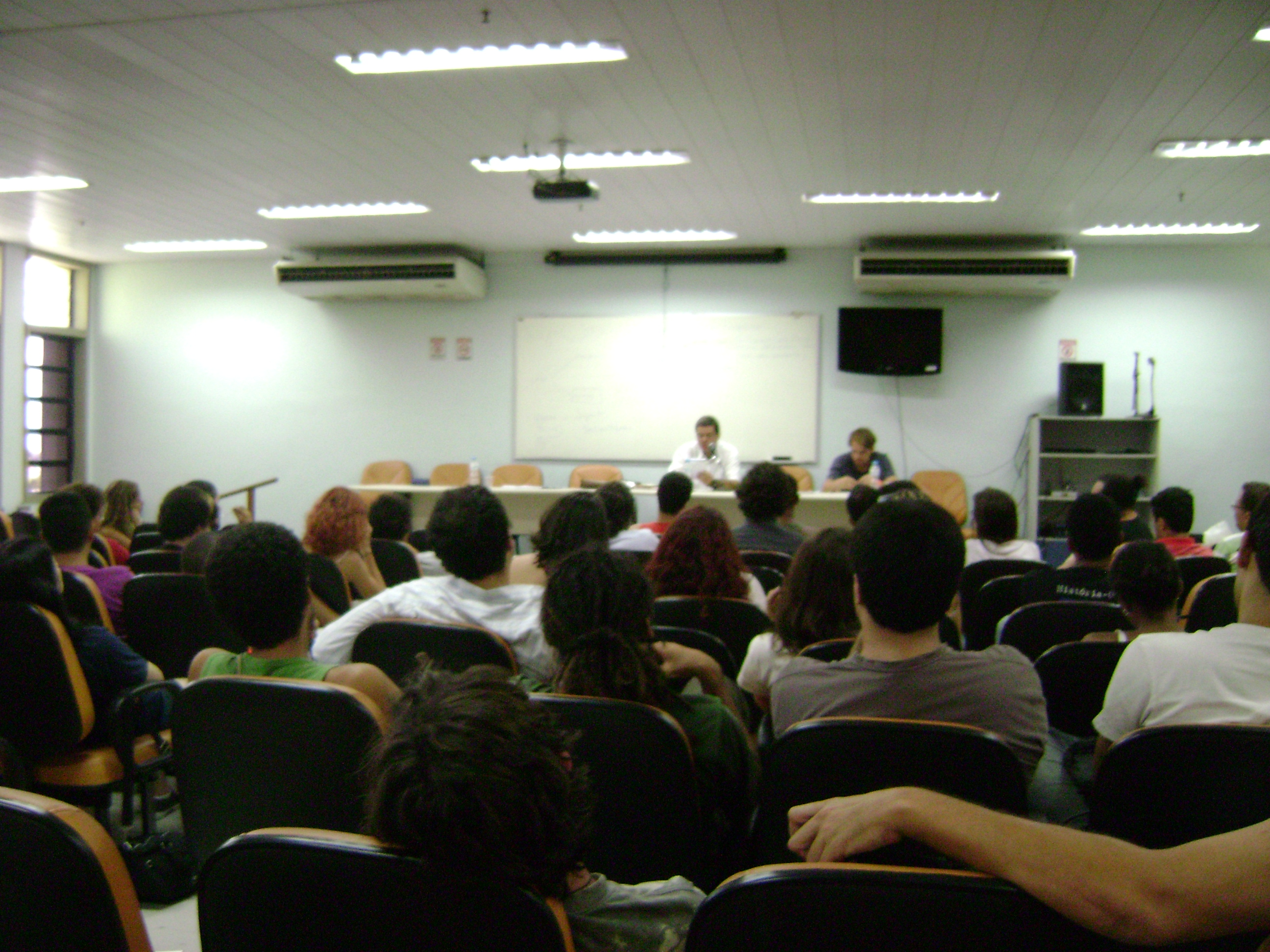 Palestra na ENEFIL 2011, em Niterói, Rio de Janeiro, Brasil. XXVII Encontro Nacional dos Estudantes de Filosofia.